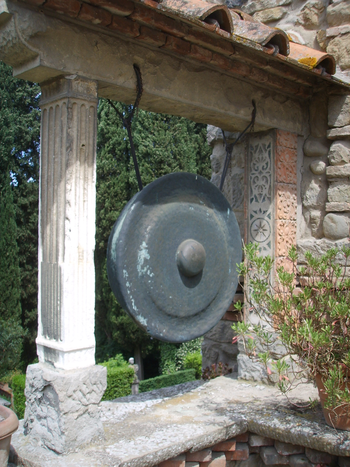 Villa nieunwekamp, gong